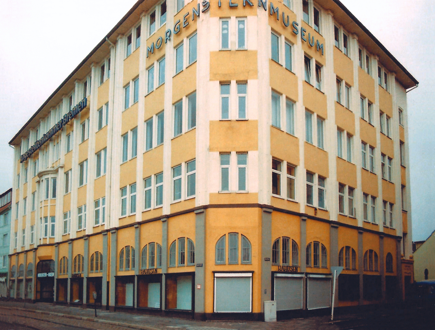 Morgenstern-Museum in der Kaistraße Bremerhaven, bearbeitet von Benutzer:AxelHH